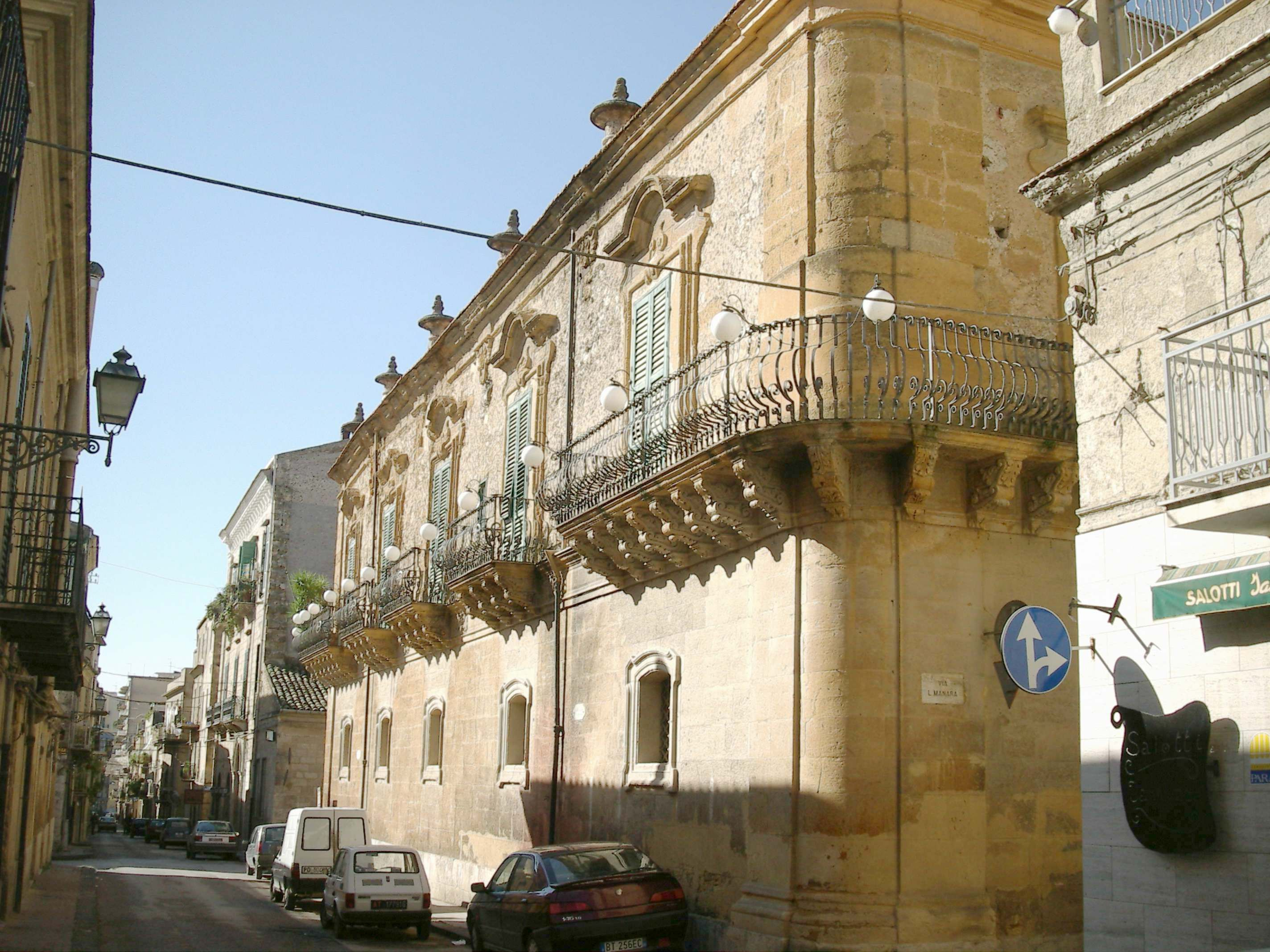 Autore: solfano - Palazzo la Lomia Descrizione: Canicattì (AG) - Sono il detentore del copyright sull'immagine, che avevo rilasciato a Wikipedia con licenza "Creative Commons by-nc 2.5", cambio la licenza d'uso con una licenza libera --Solfano 12:46, 27 apr 2007 (CEST)